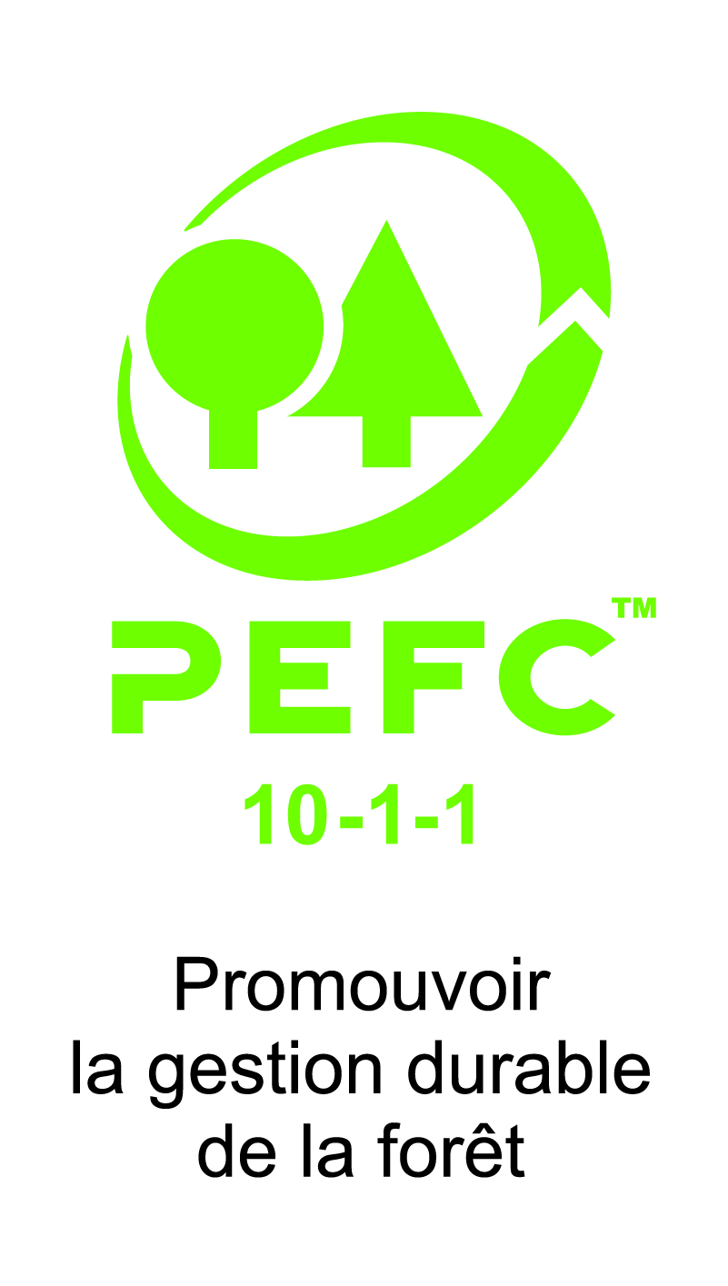 Copyright : PEFC France